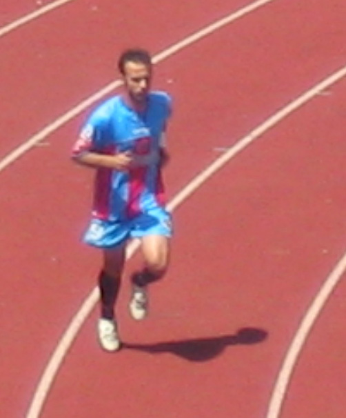 Giuseppe Mascara ha appena consegnato i fiori in ricordo dei tifosi scomparsi il 21 maggio. Catania-AlbinoLeffe 2-1